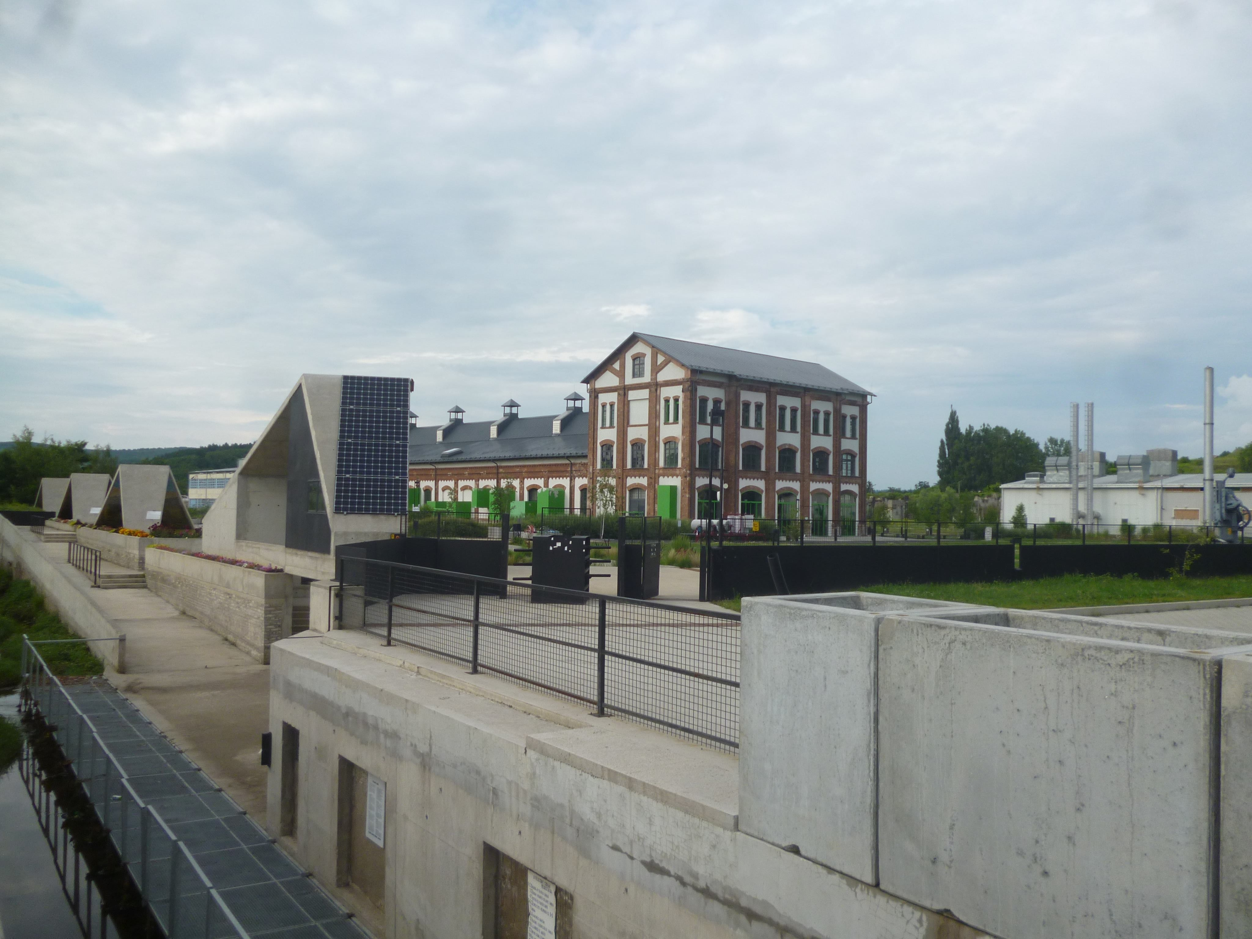 A Filmtörténeti Emlékpark a Kohászat idején fúvógépházként üzemelt